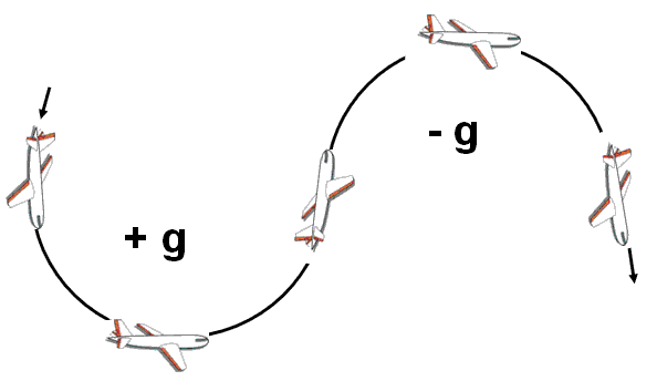 g-Kräfte beim Looping